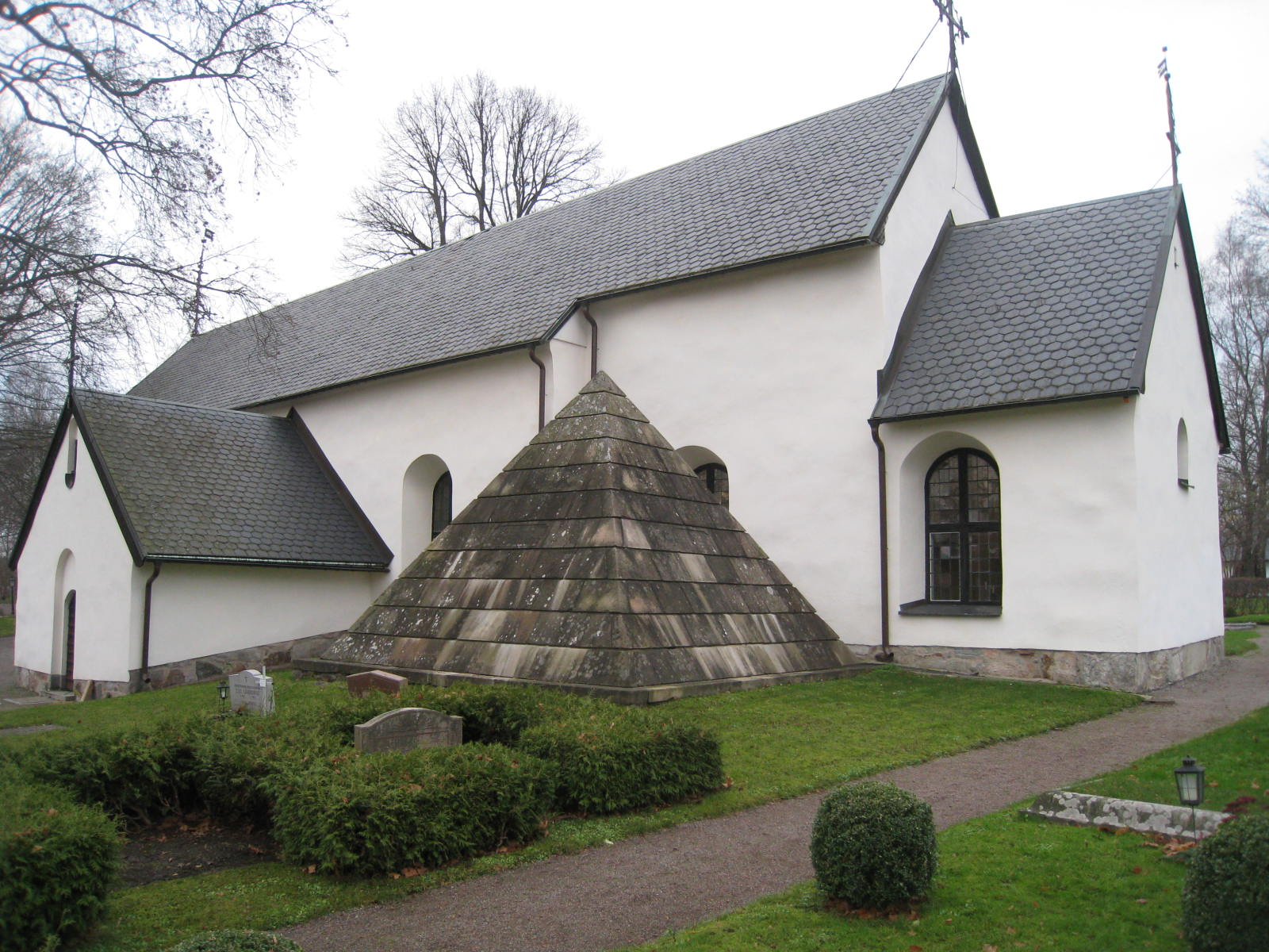 Adlerbergska gravkoret vid Järfälla kyrka, Järfälla socken, Stockholms län.